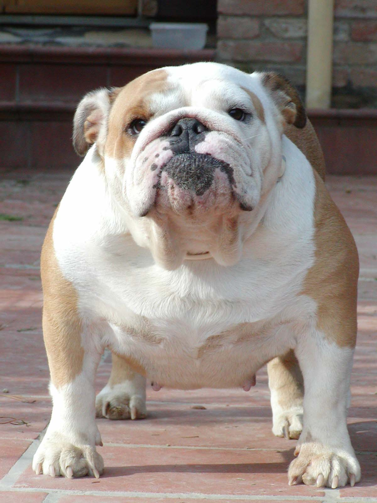 CH Pickwick Cookie Sweet una delle capostipiti dell'allevamento Buck and Sons